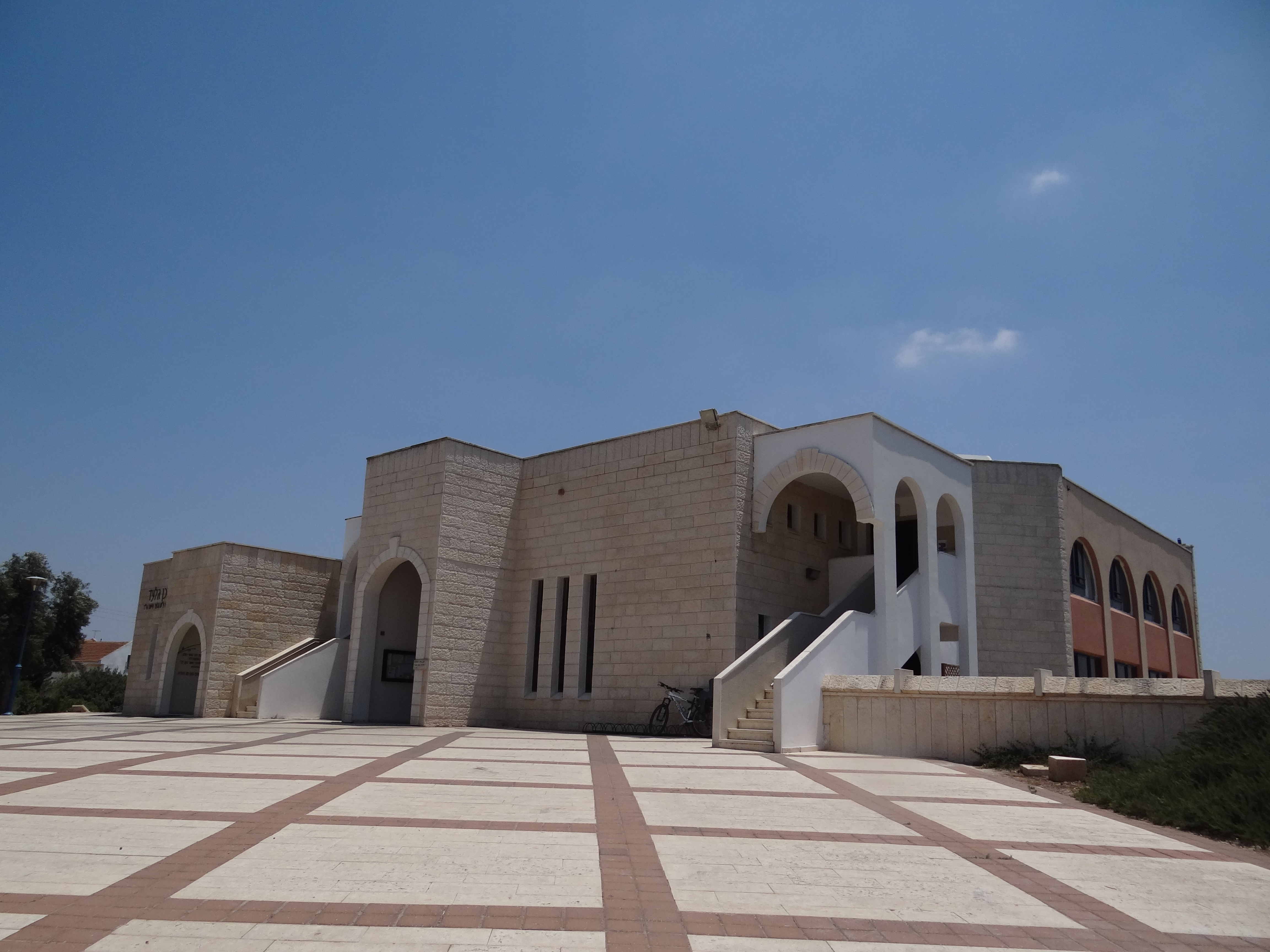 בית הכנסת המרכזי של היישוב הקהילתי הושעיה השוכן בגליל התחתון